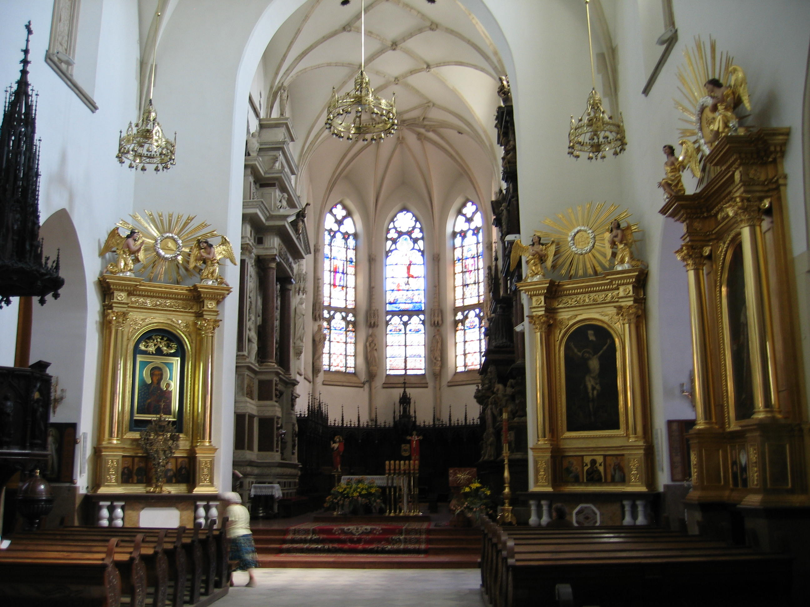 Wnętrze katedry Narodzenia Najświętszej Marii Panny w Tarnowie